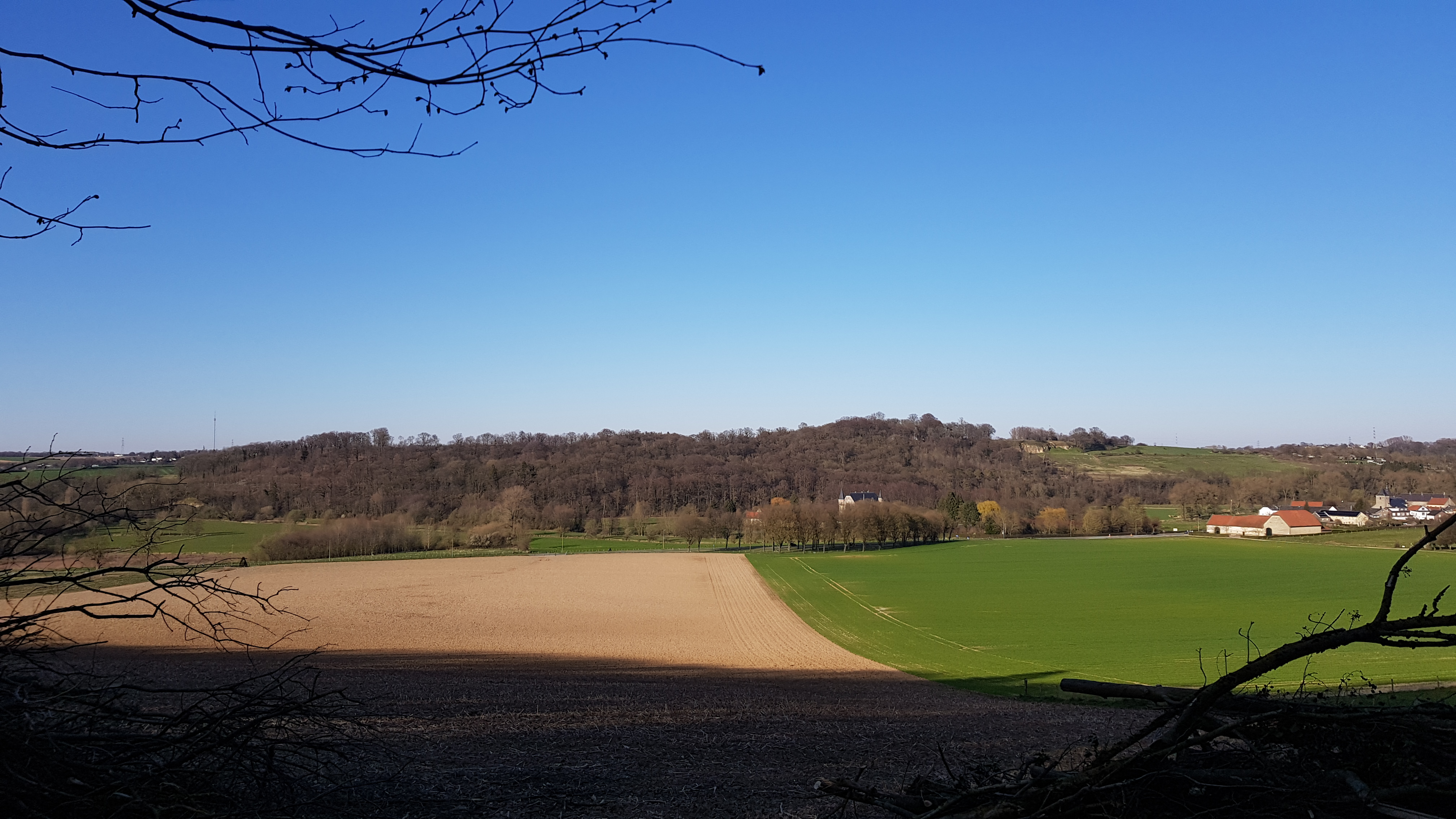 Schaelsbergerbos gezien vanuit het Biebosch, Valkenburg, Nederland